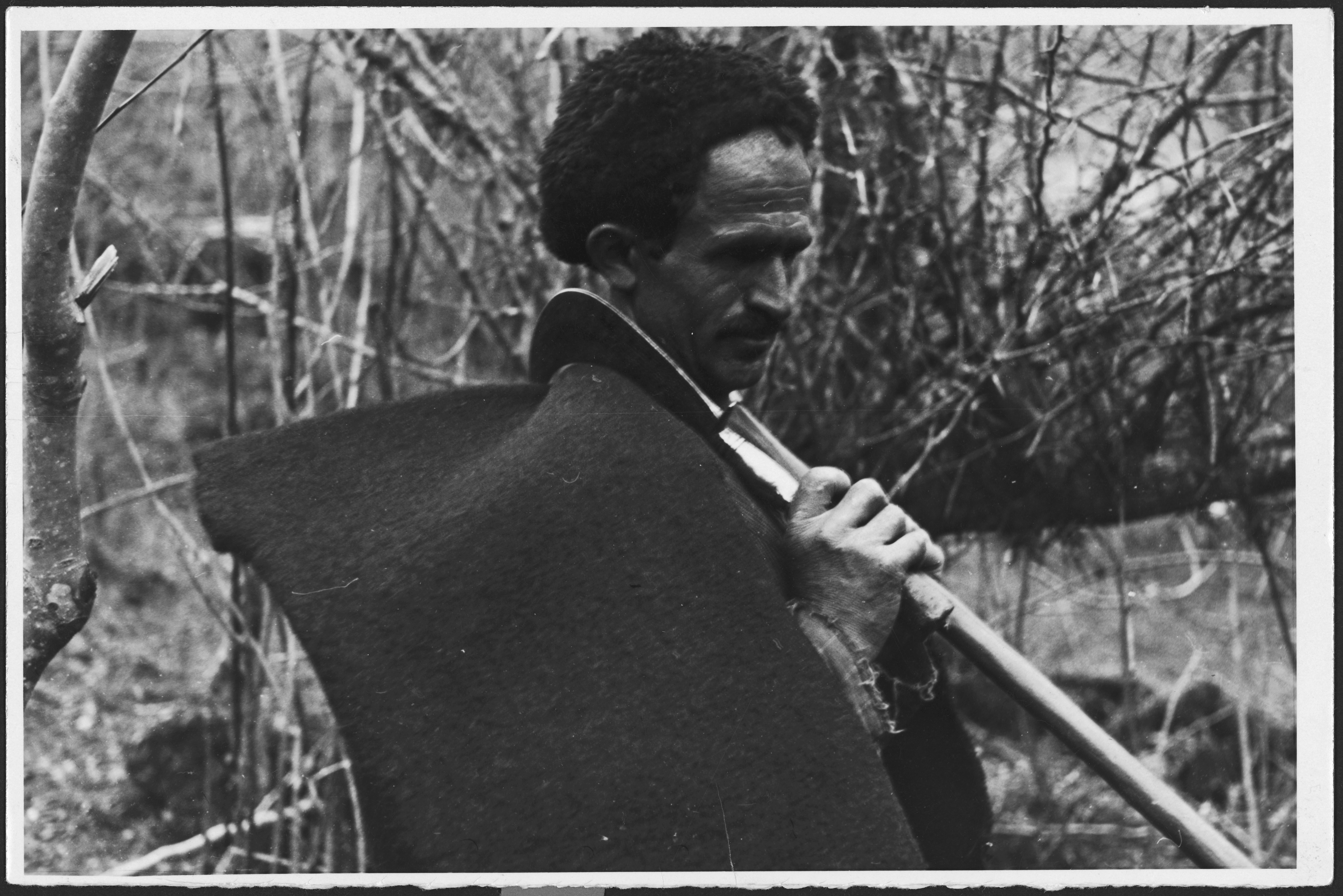 Persien, Mazanderan (Mazandaran): Porträt; Porträt eines Mannes